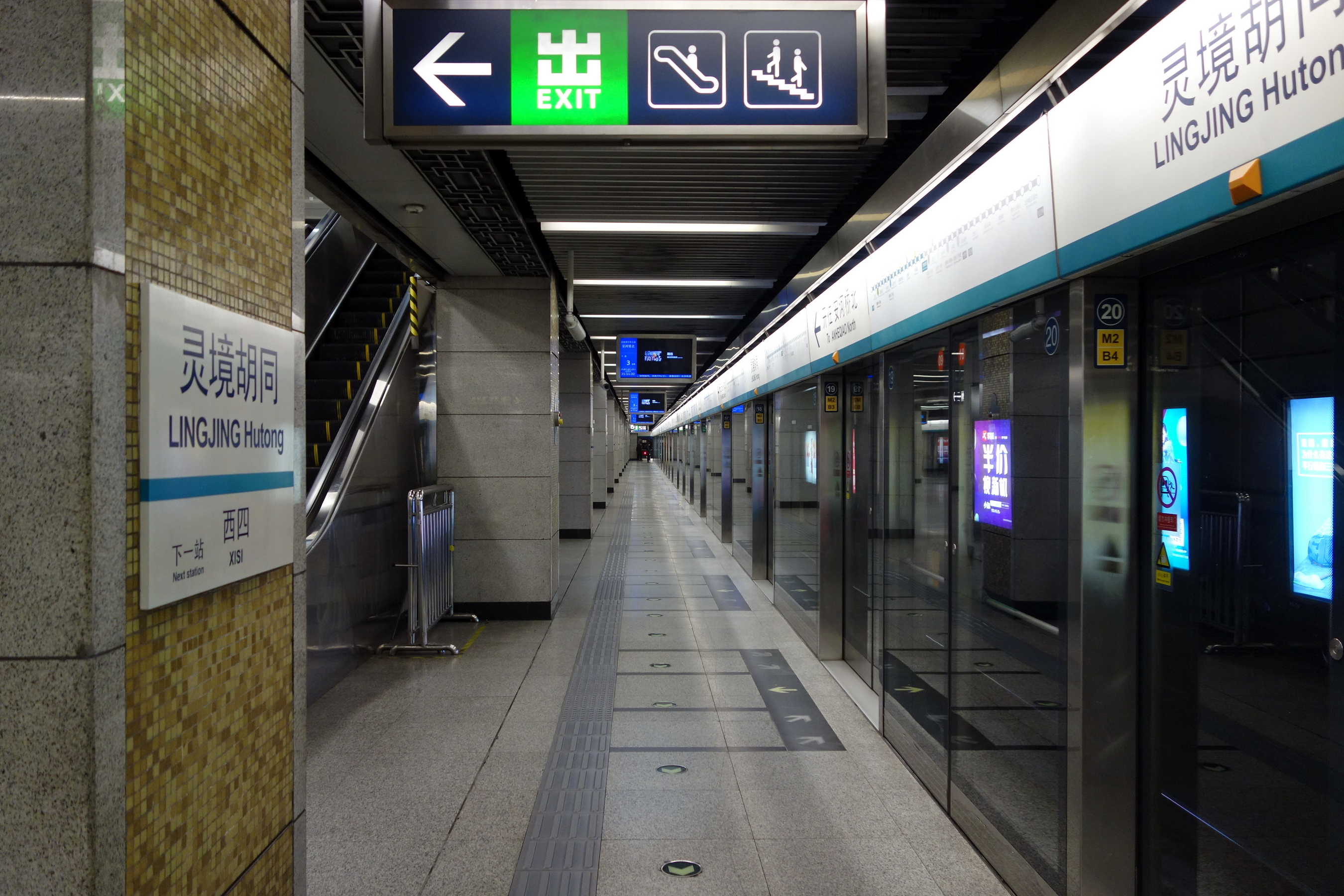 北京地铁4号线灵境胡同站站台